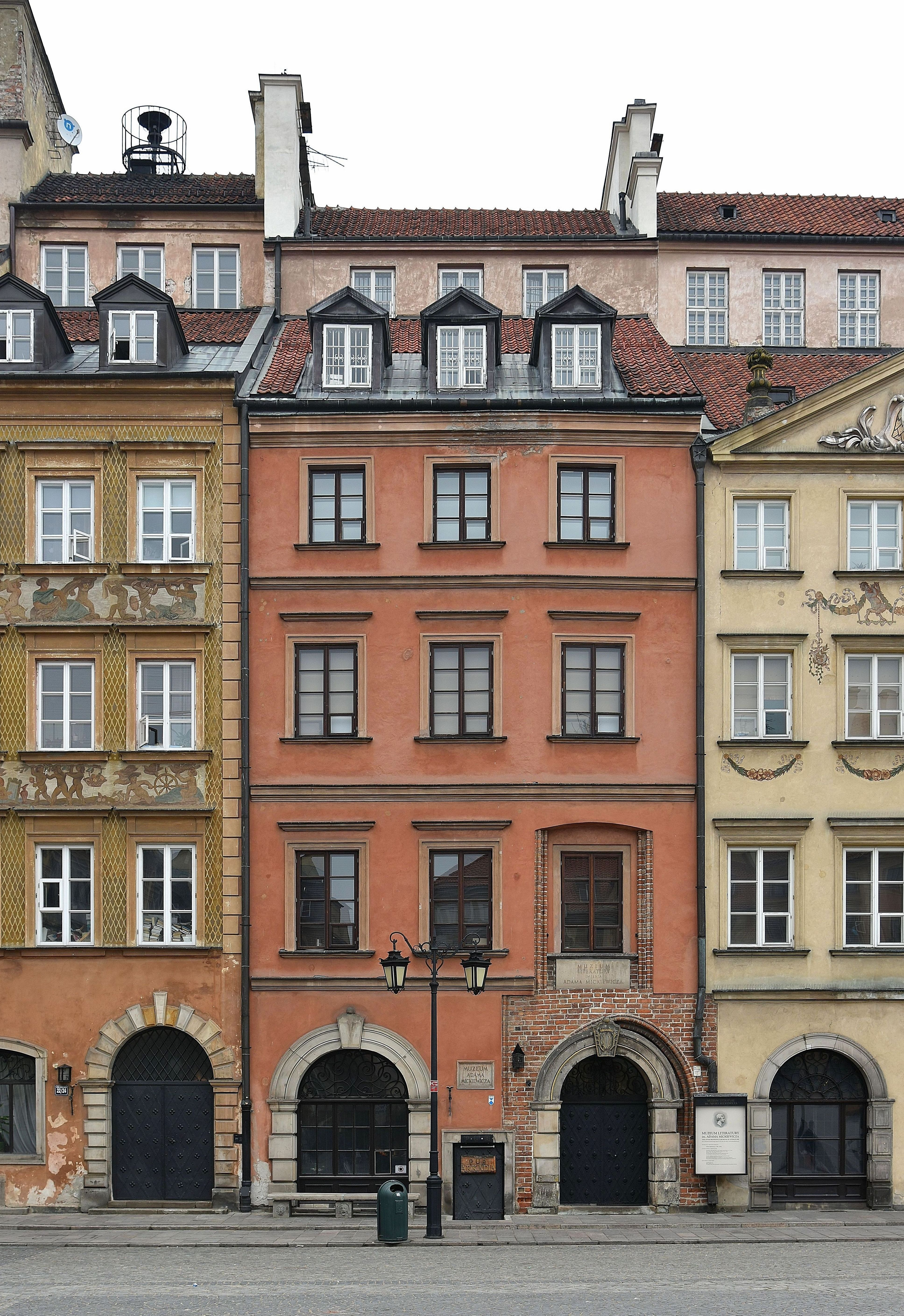 Kamienica Balcerowska (Winklerowska) w Warszawie